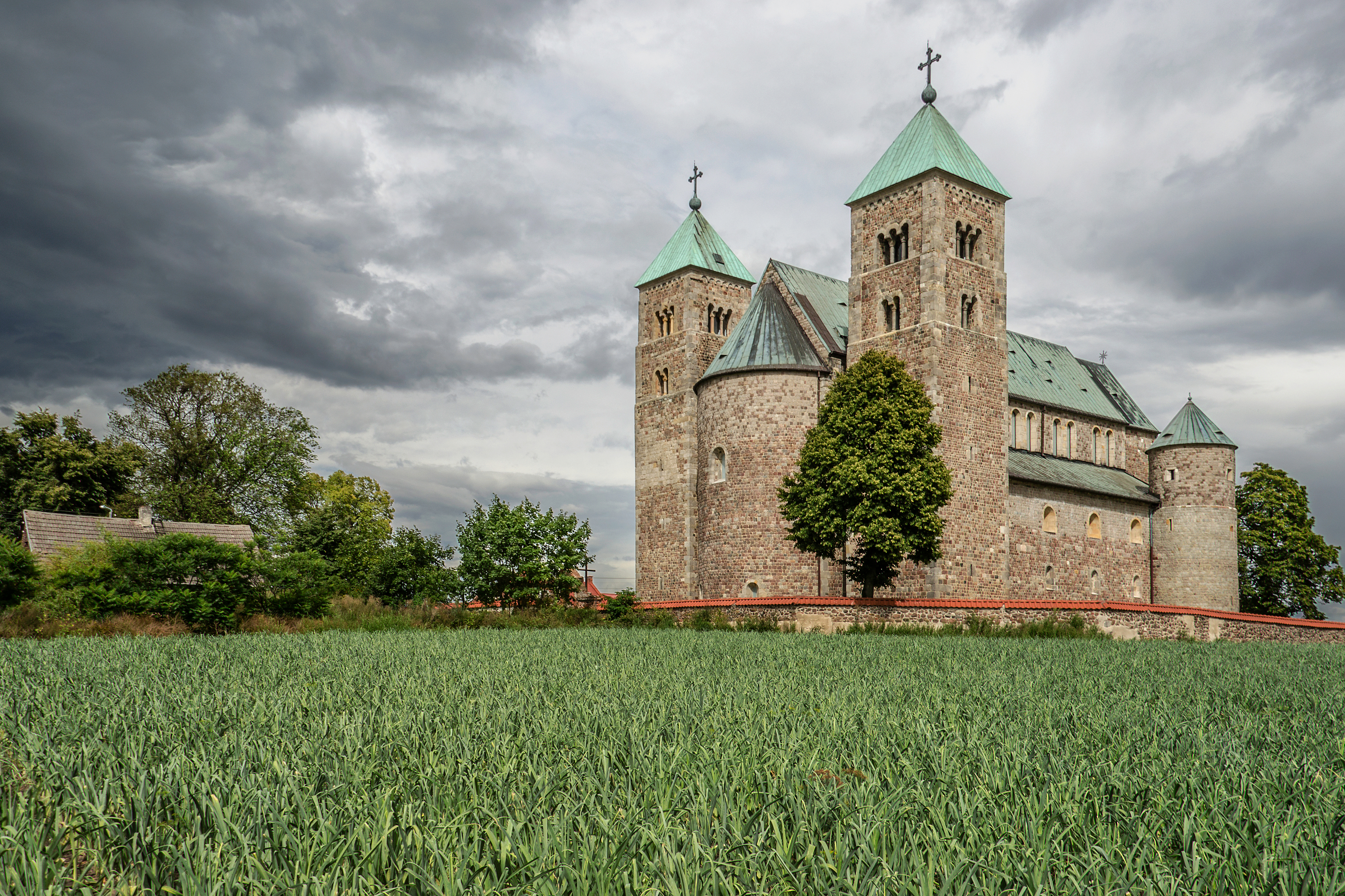 Tum, kolegiata p.w. NMP i św. Aleksego, 1161, XV, XVIII, 1952 Ta fotografia przedstawia zabytek wpisany do rejestru zabytków pod numerem ID 612614